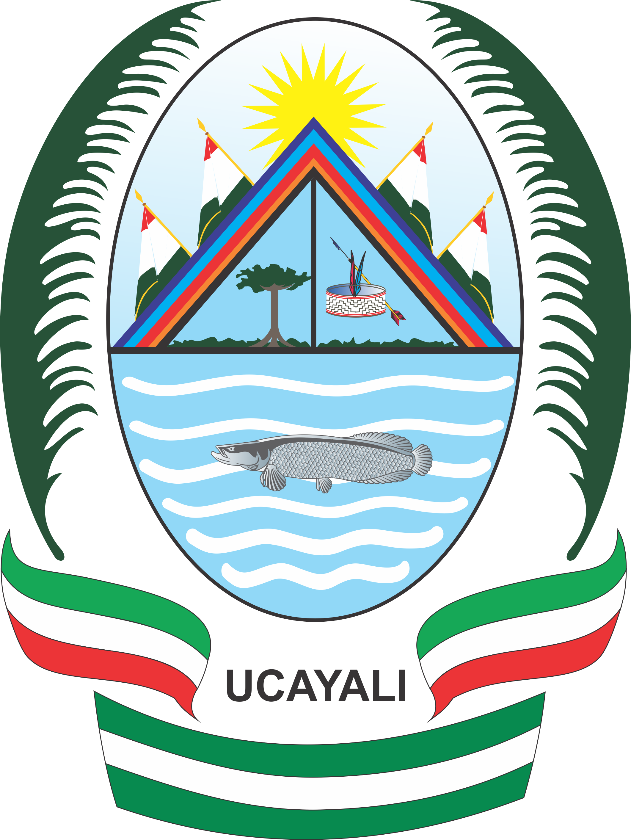 Representa el símbolo regional de Ucayali